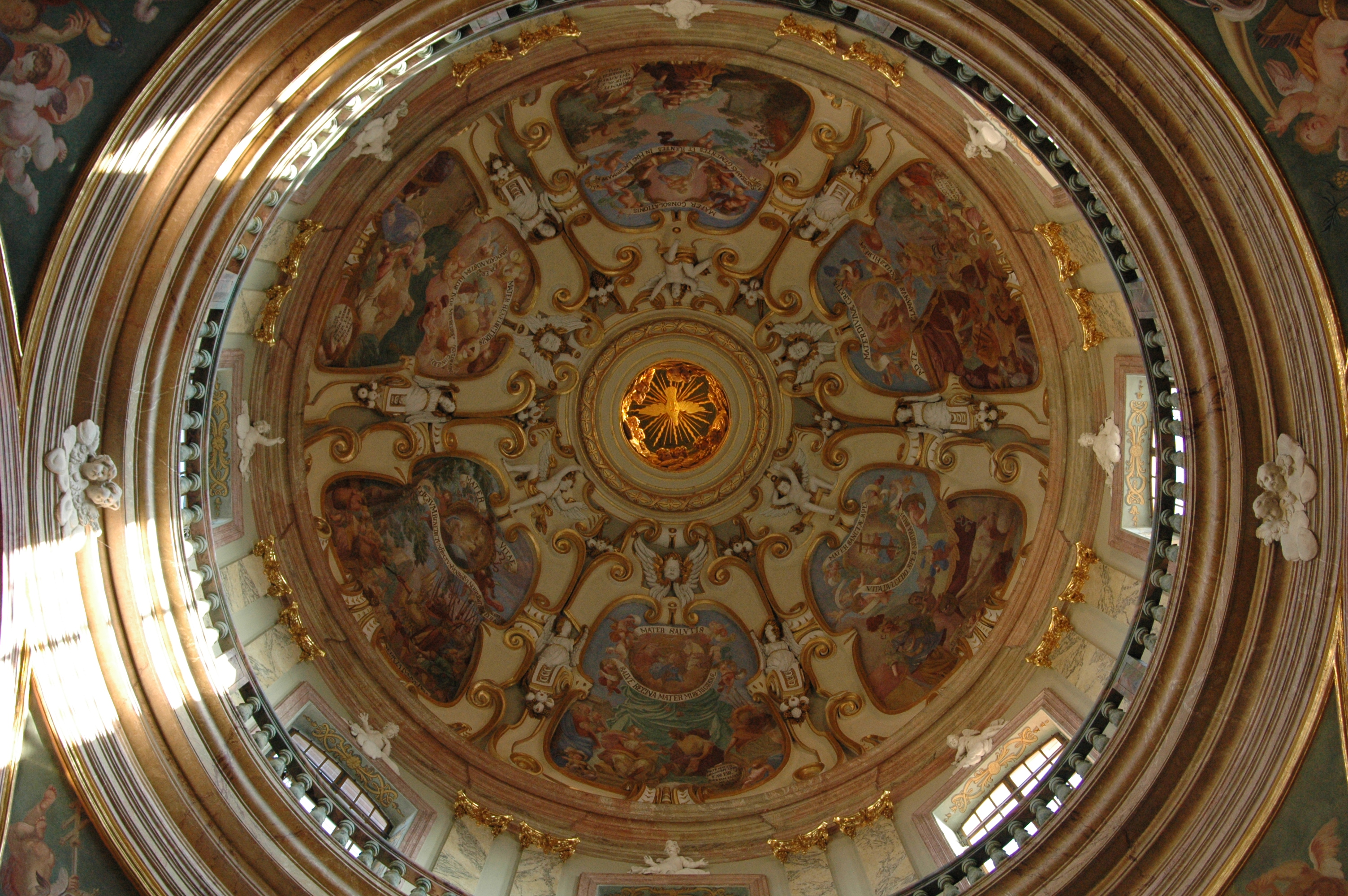 Kopule chrámu na Svatém Kopečku